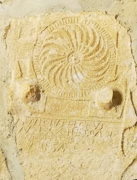 Hilarri erromatarrak Kontrastako Elizmendiko baselizan. Alboz jarrita daude paretetan.